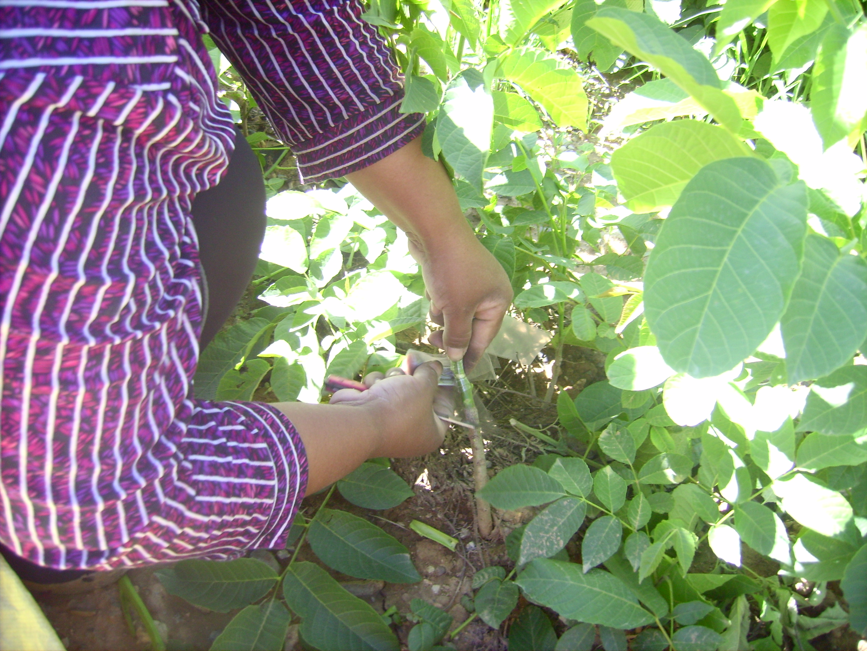 中文（中国大陆）: 核桃树的嫁接技术